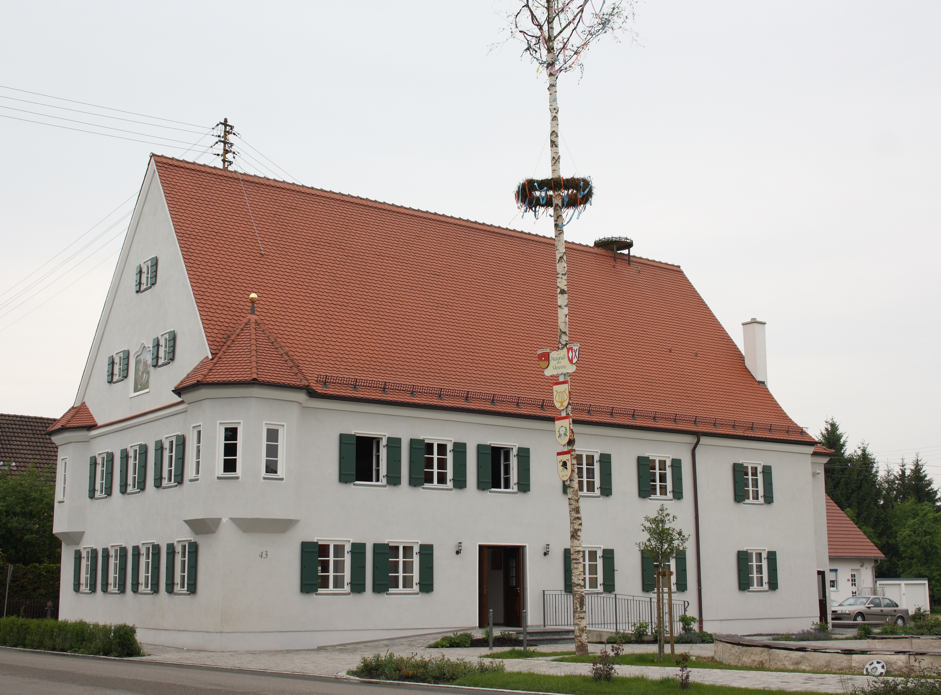 ehemaliges Gasthaus zur Krone in Weisingen, einem Ortsteil von Holzheim im Landkreis Dillingen an der Donau, bez. 1737